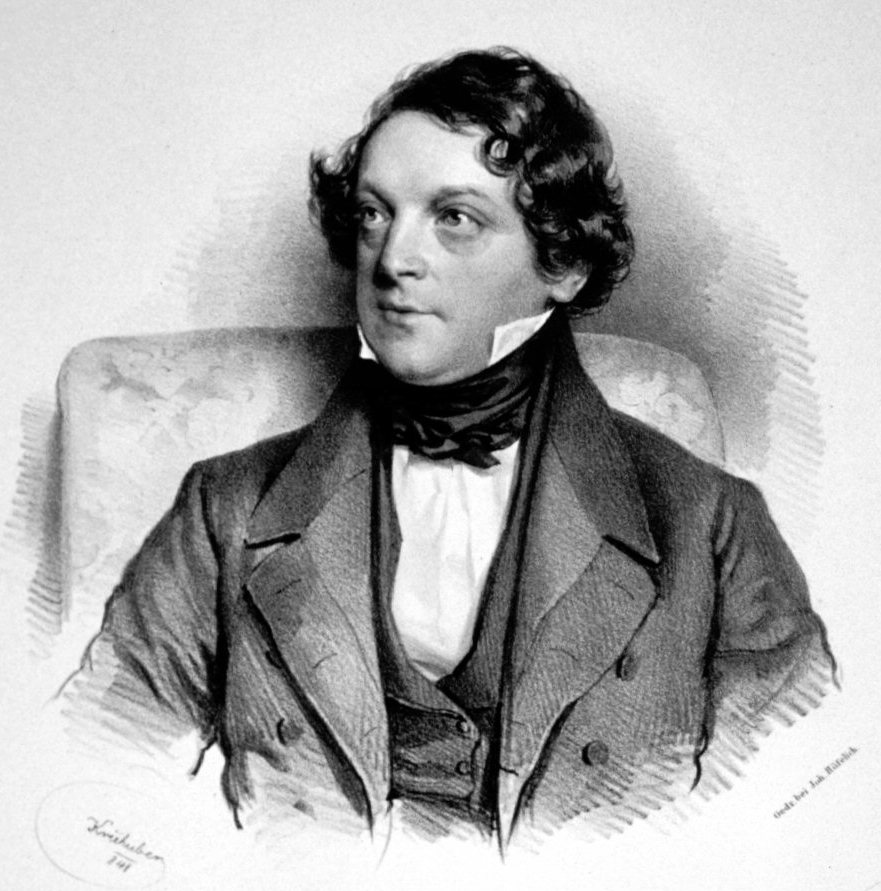 Domenico Donzelli (1791-1873) war ein italienischer Opernsänger (Tenor).